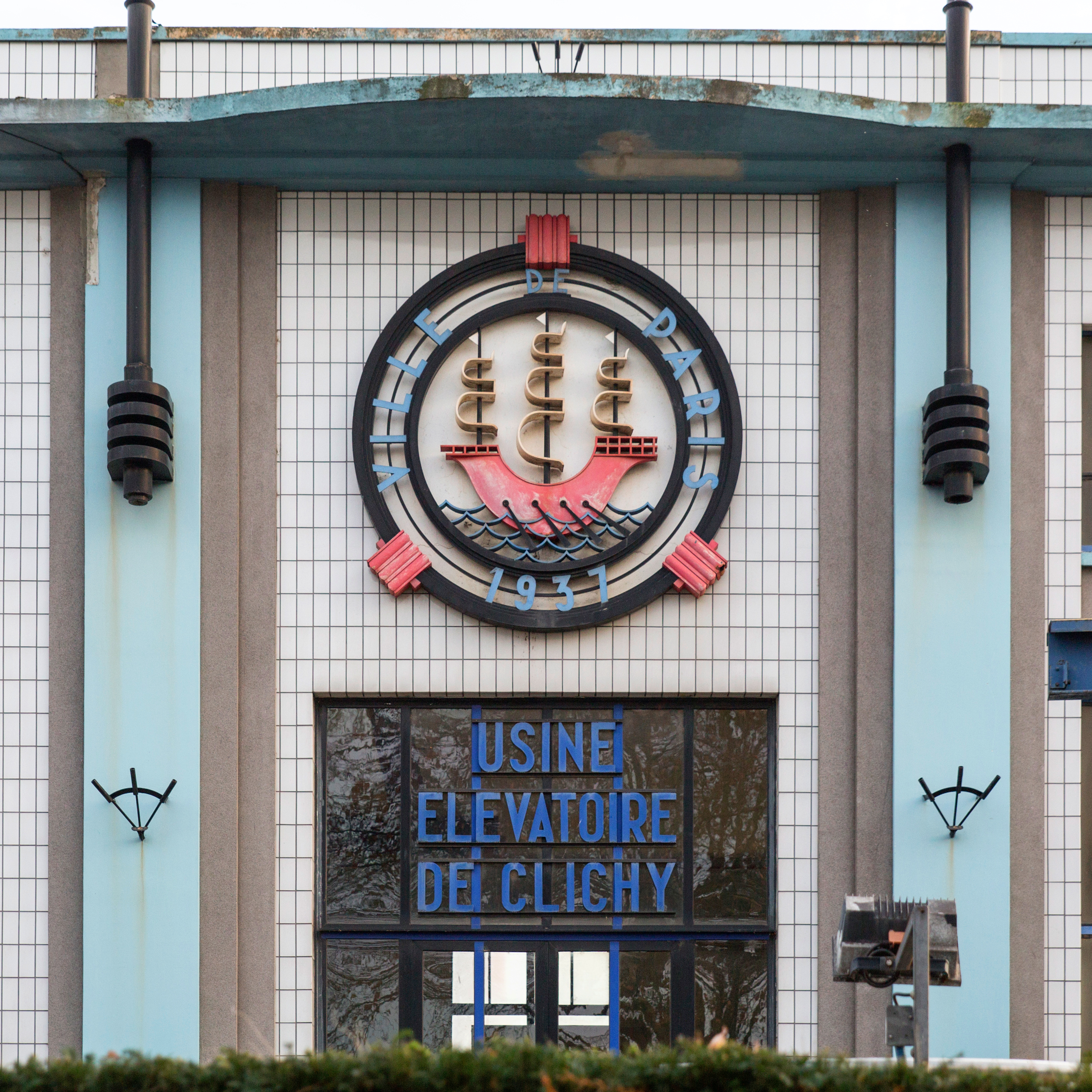 Logo de la ville de Paris à l'entrée de l'usine élévatoire de Clichy